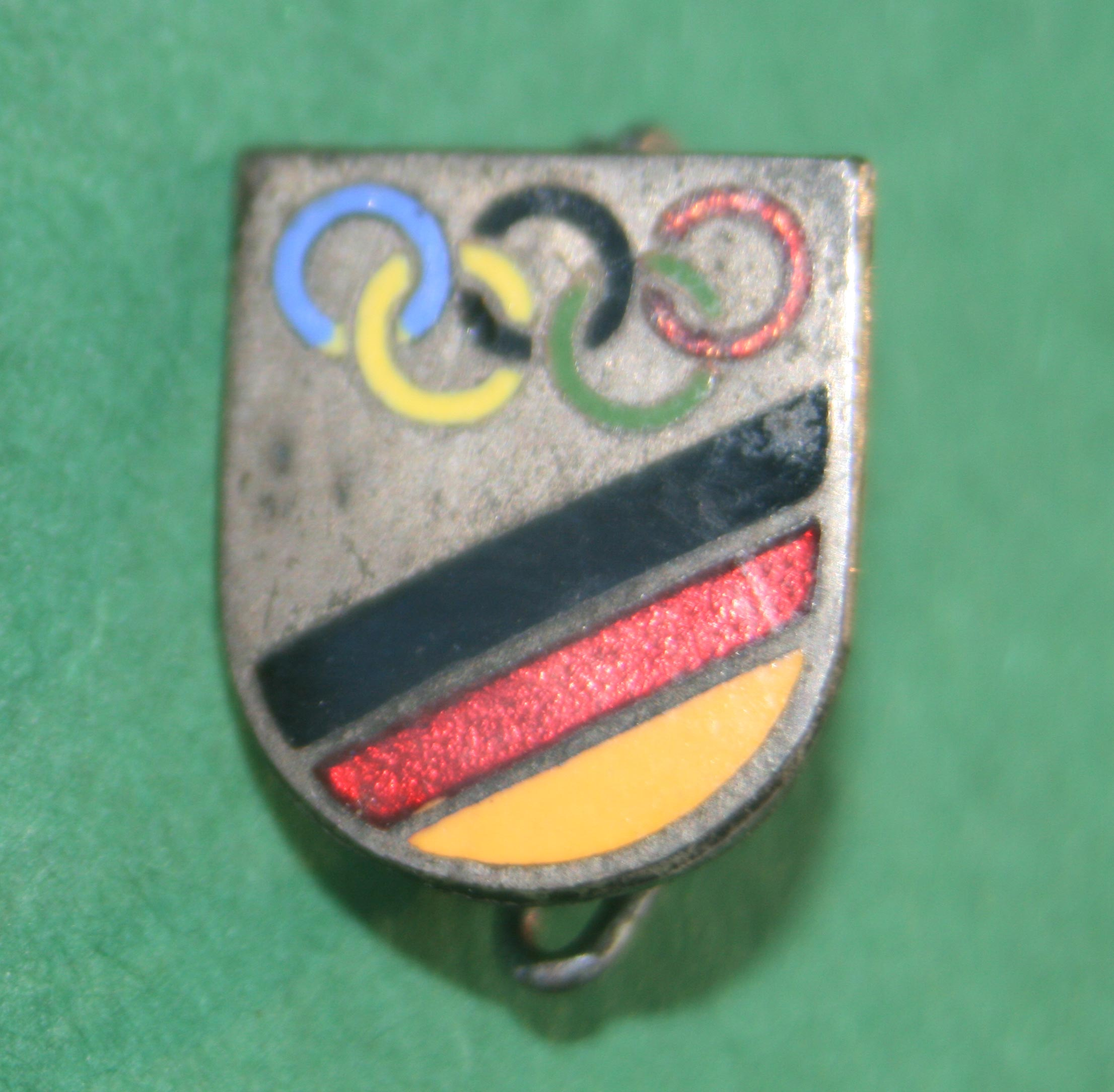 Olympia-Anstecknadel DFB